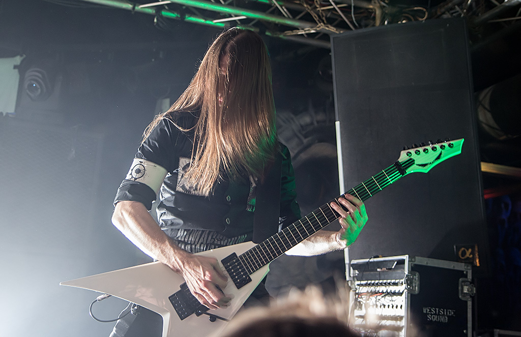 Arch Enemy 17.10.2012 Rockfabrik, Ludwigsburg